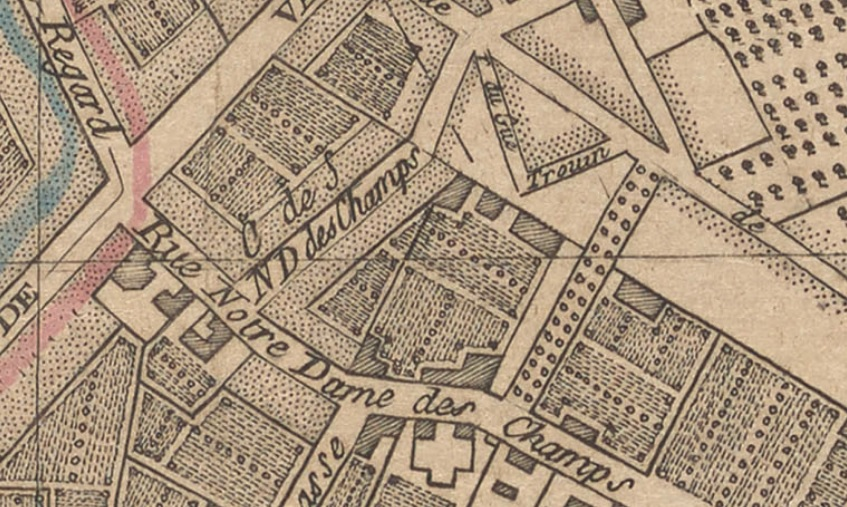 Détail d'un plan de Paris de 1809 figurant le quartier environnant la rue Duguay-Trouin.